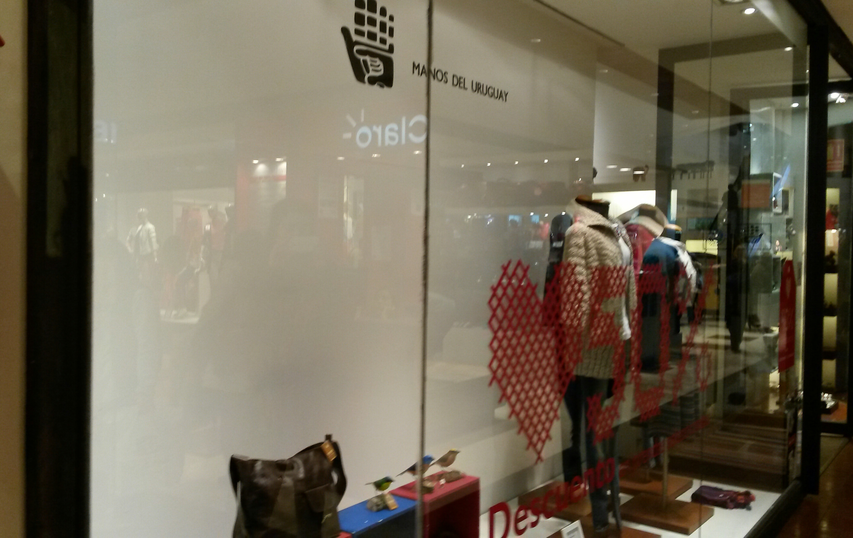 Foto tomada en Montevideo Shopping